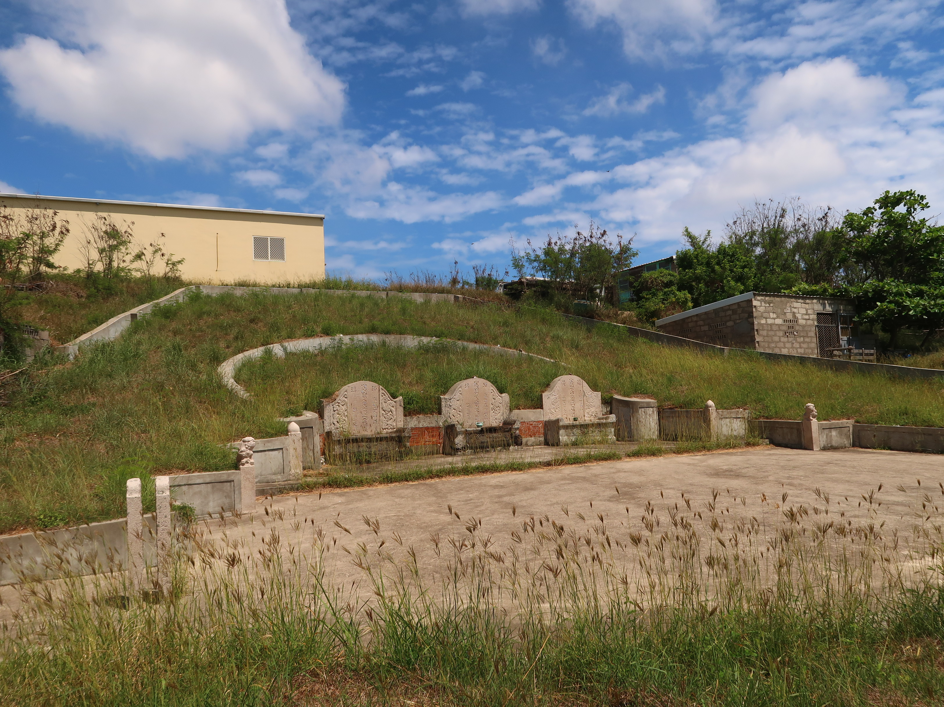 媽宮舉人鄭步蟾佳城